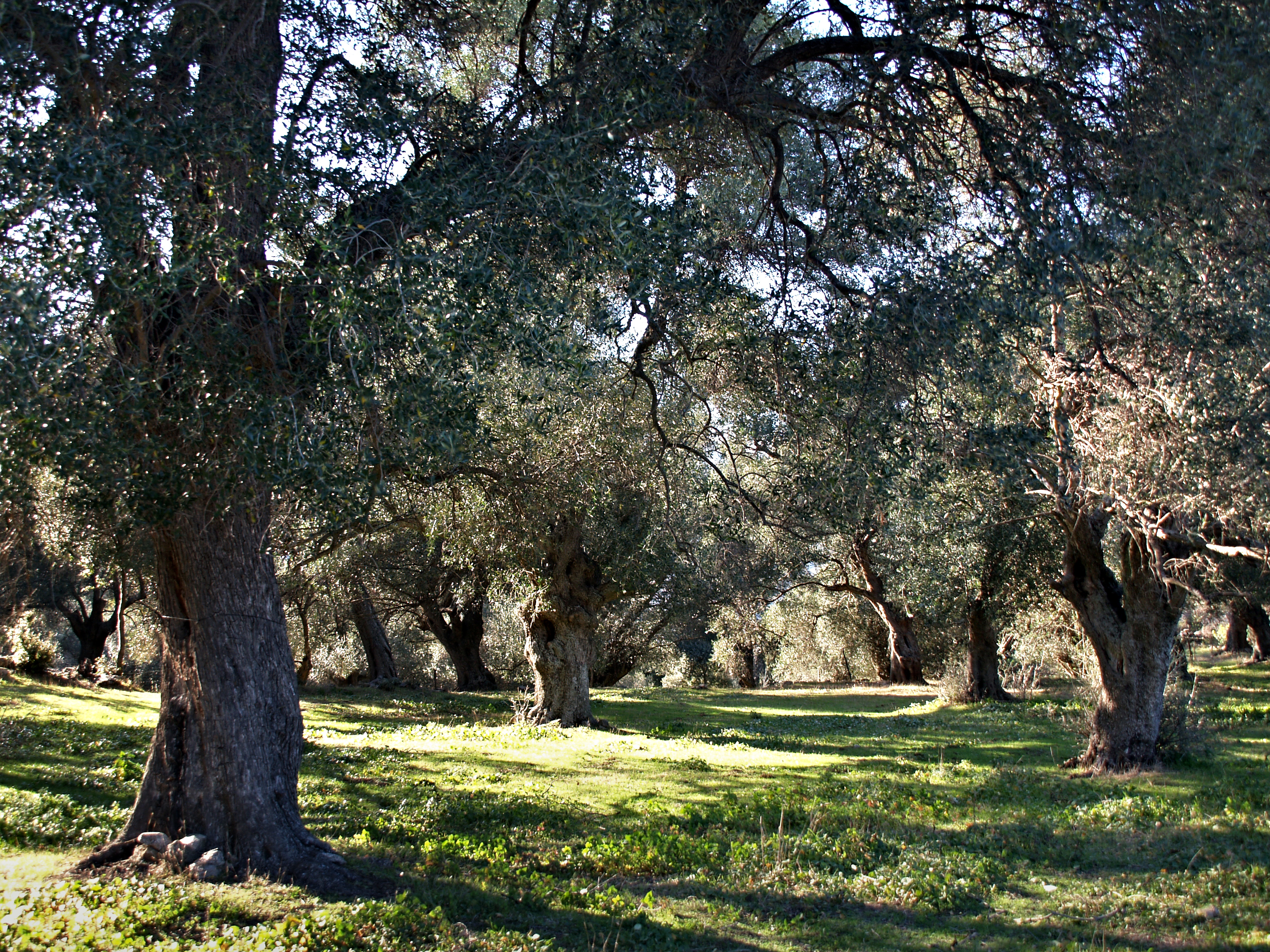 Muro, Balagne (Corse) - Champ d'oliviers séculaires à côté du cimetière à Murato